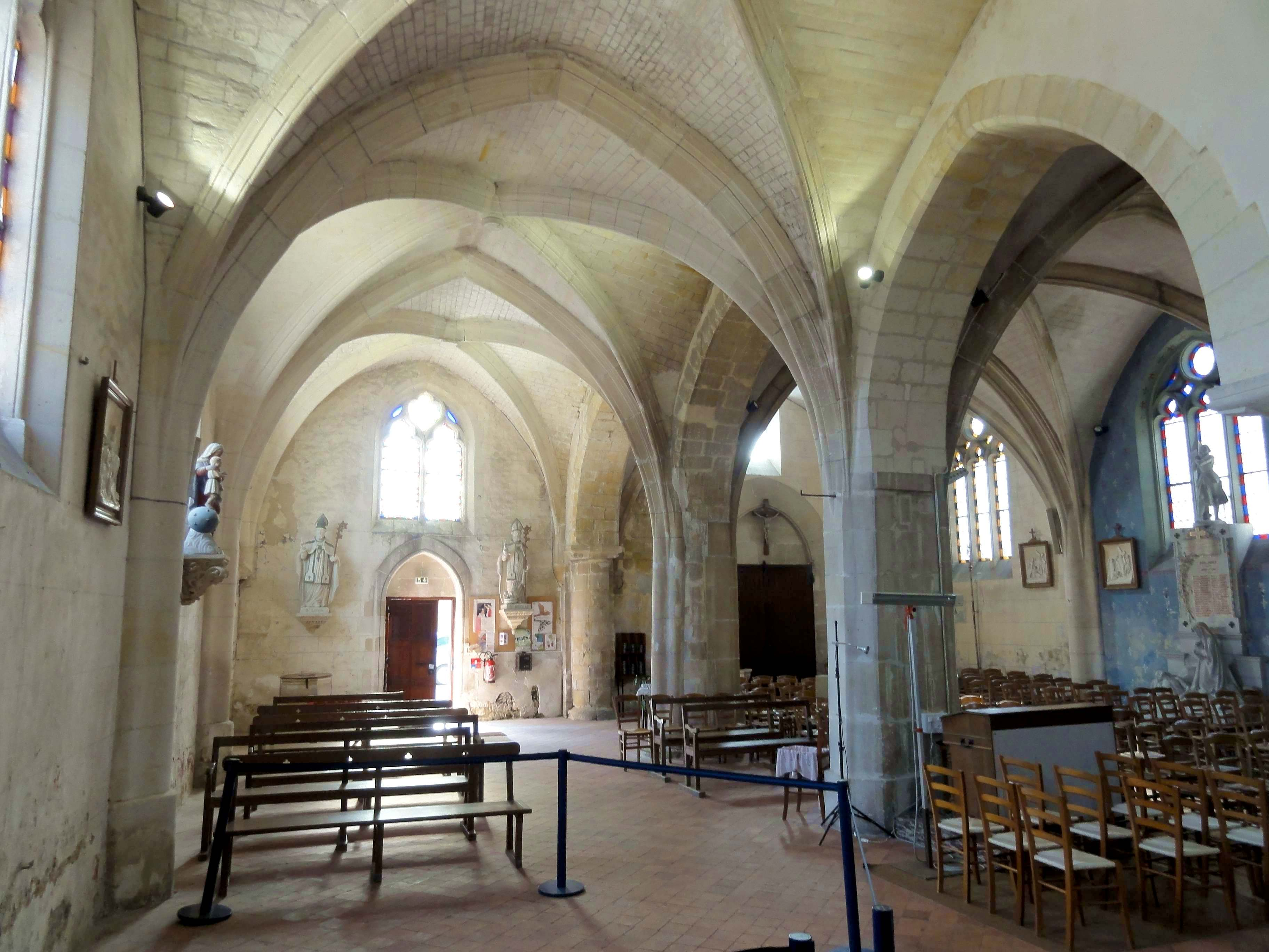 Intérieur de l'église (voir titre).